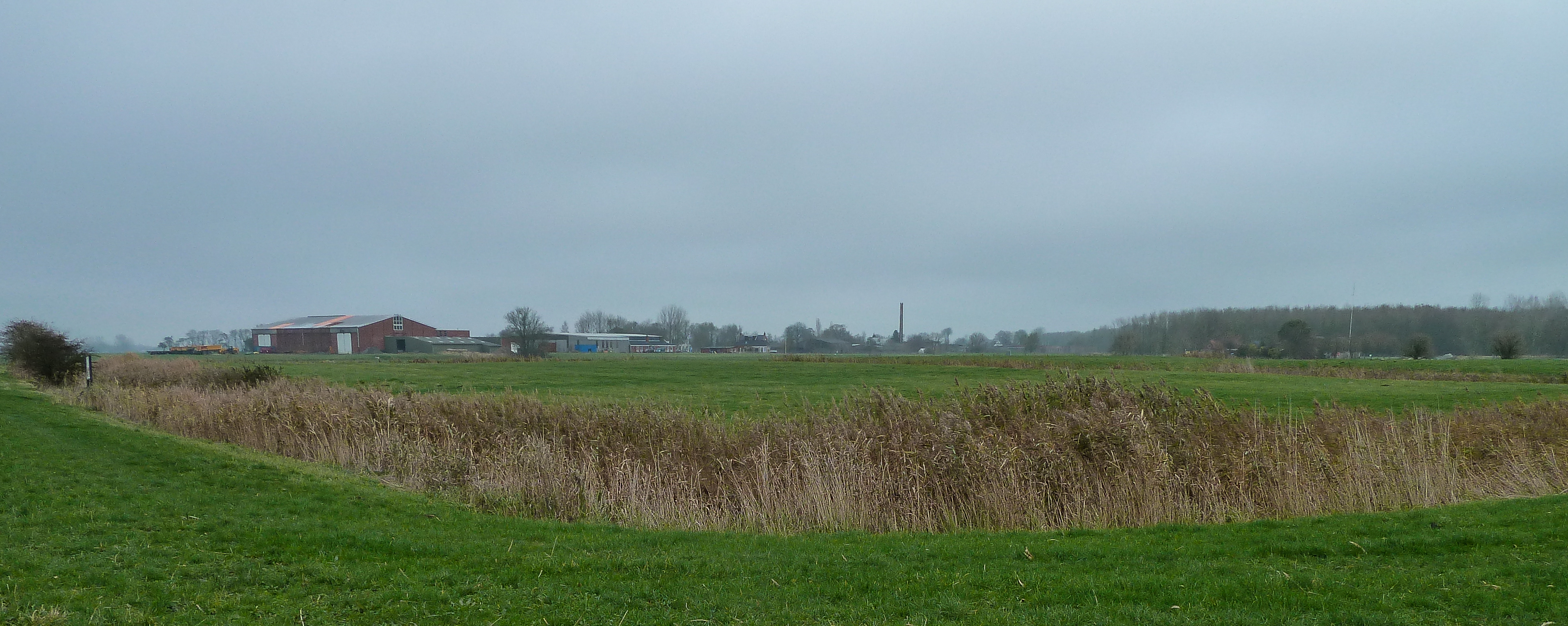 Overzicht borgterreinen Tammingahuizen